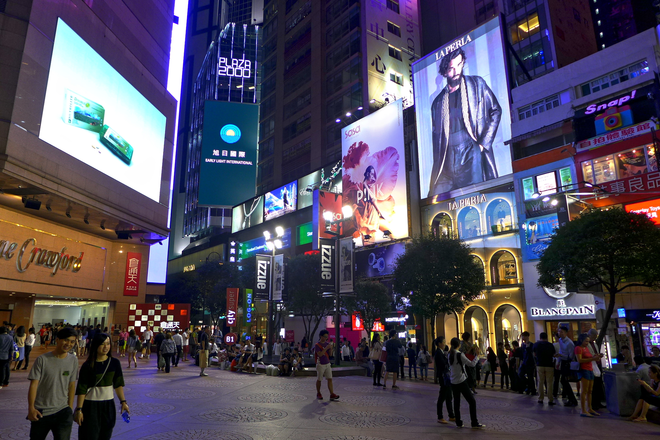 Russell Street Buildings at Night